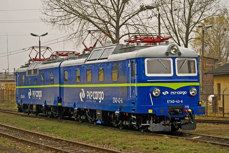 Lokomotywa elektryczna ET40-43 stoi na terenie stacji Bydgoszcz Wschód.